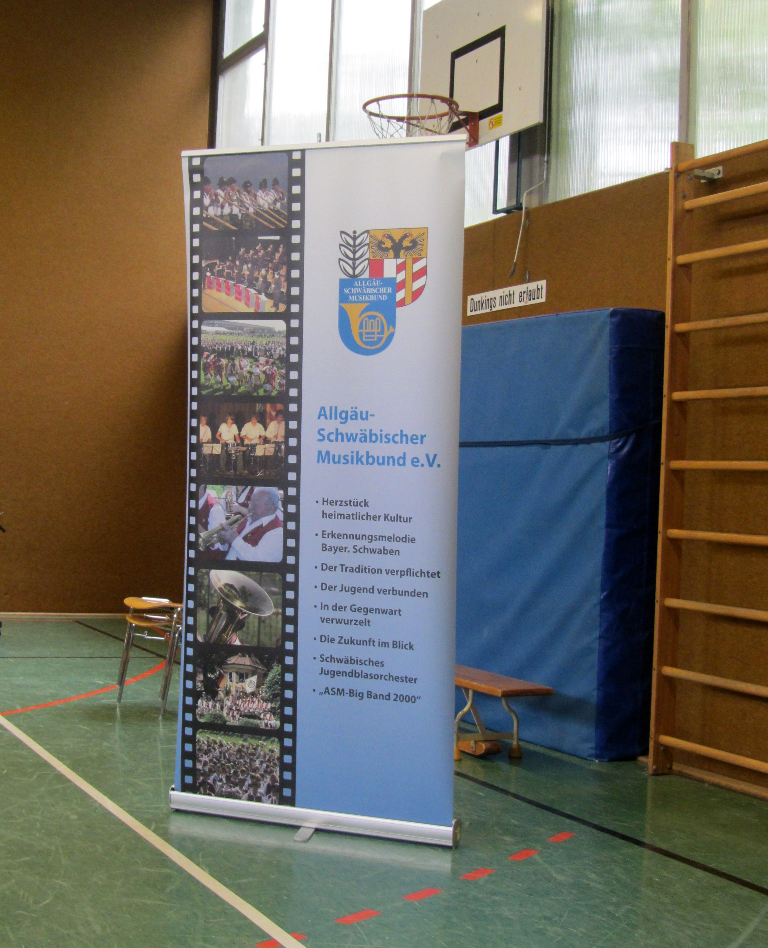 Turnhalle Sebastian-Kneipp-Mittelschule